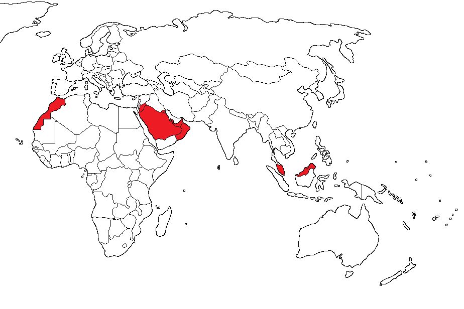 Monarquias islamicas